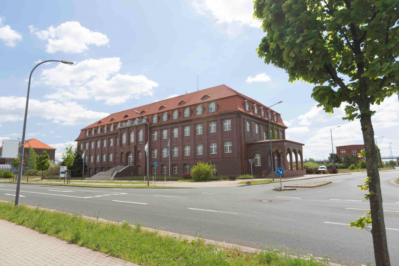 Das 2016/2017 renovierte Verwaltungsgebäude des Chemiepark Bitterfeld-Wolfen